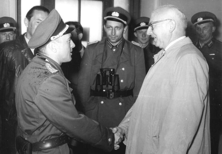 ADN-ZB-Weigelt-Berlin: Volkspolizei während des Einsatzes zur Durchsetzung der Grenzsicherungsmaßnahmen der DDR vom 13.8.1961. Ernst Golenbaum, Vorstitzender der SED, besuchte am 22.8.1961 eine VP-Einheit am Brandenburger Tor und überbringt Geschenke der Bauern. - Ernst Goldenbaum begrüßt einen Offizier der VP. Veröffentlichung nur mit Genehmigung der Pressestelle des MDI.